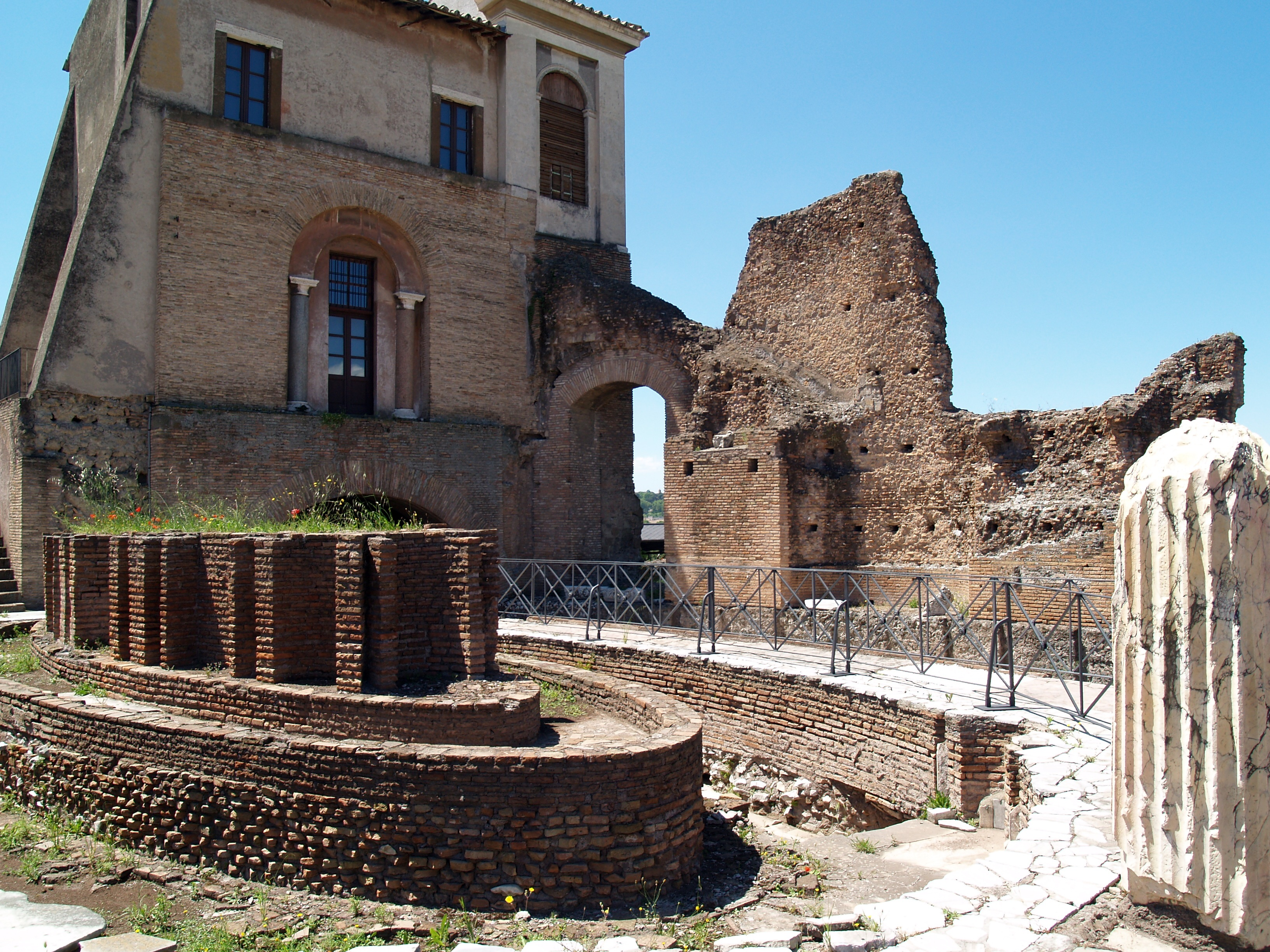 Roma. Palatino. Domus Flavia.